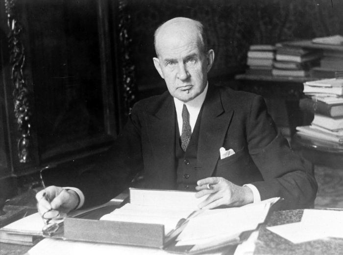 Repronegatief. Portret van Gouverneur-Generaal De Graeff achter zijn schrijftafel